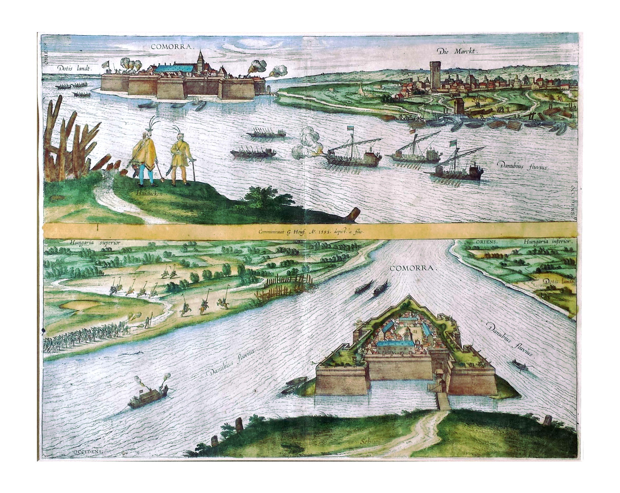 Komárom kétosztatú felülnézeti képe. Színezett rézmetszet. A Georg Hoefnagel: Civitates Orbis Terrarum 5. kötet, Braun and Hogenberg 1572-1617